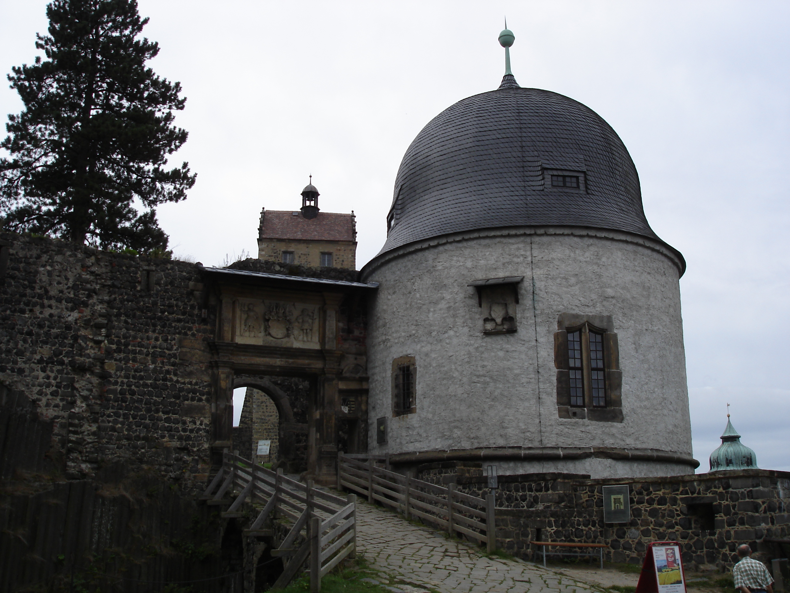 Schösserturm, Burg Stolpen